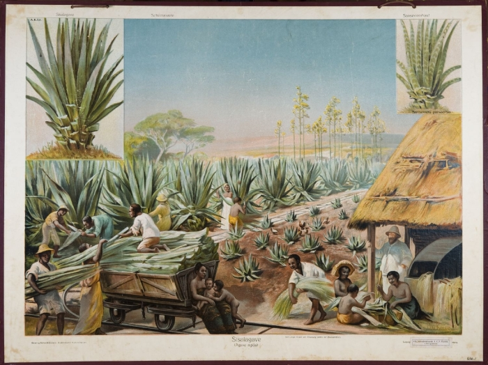 Op een zijde van de plaat staat een koloniale beambte te kijken naar de mensen die aan het werk zijn op een Caribische agave- en sisalplantage. De andere zijde toont een bananenplantage, wellicht in Afrika. De platen werden in Suriname in het onderwijs gebruikt. Hij werd gedrukt in een Duitse serie, Ausländische Kulturpflanzen.